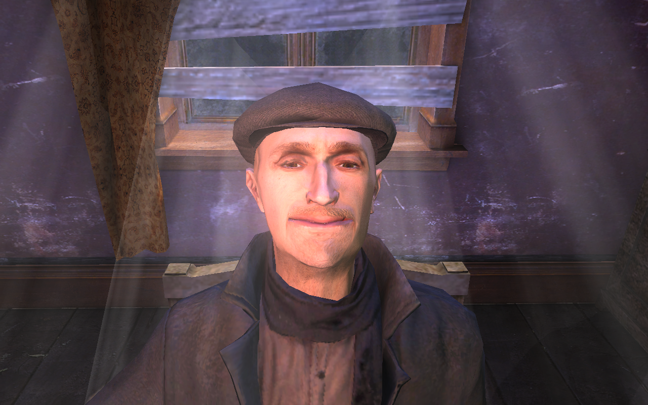 Capture d'écran du jeu Sherlock Holmes contre Jack l'Éventreur. Jacob Levy, arborant un sourire grimaçant après avoir avoué ses meurtres à Sherlock Holmes.